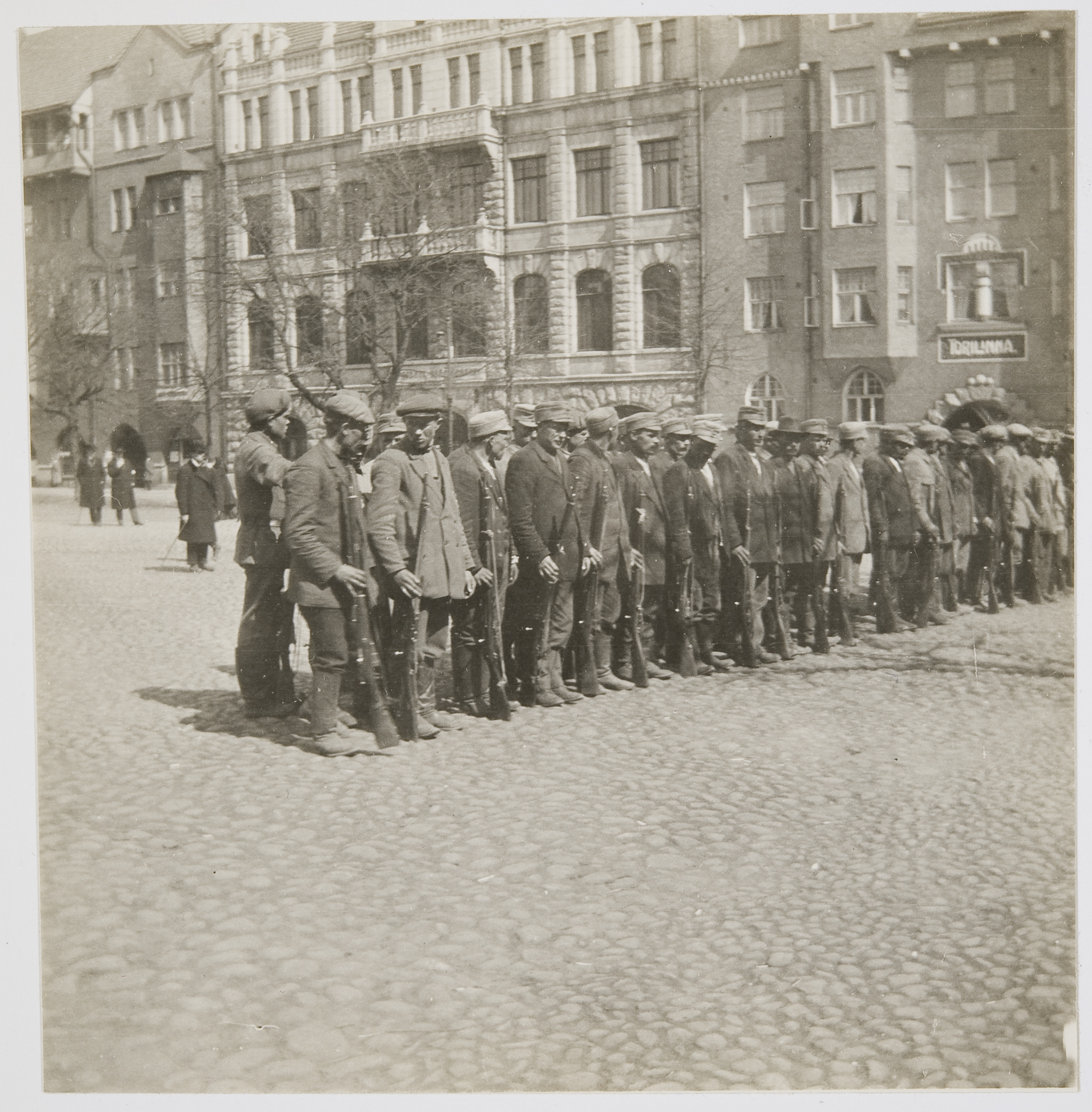 kiväärimiehiä Kasarmitorilla; vaaka, mustavalkoinen, kiinnitetty kartongille, jonka koko 33 x 23 cm